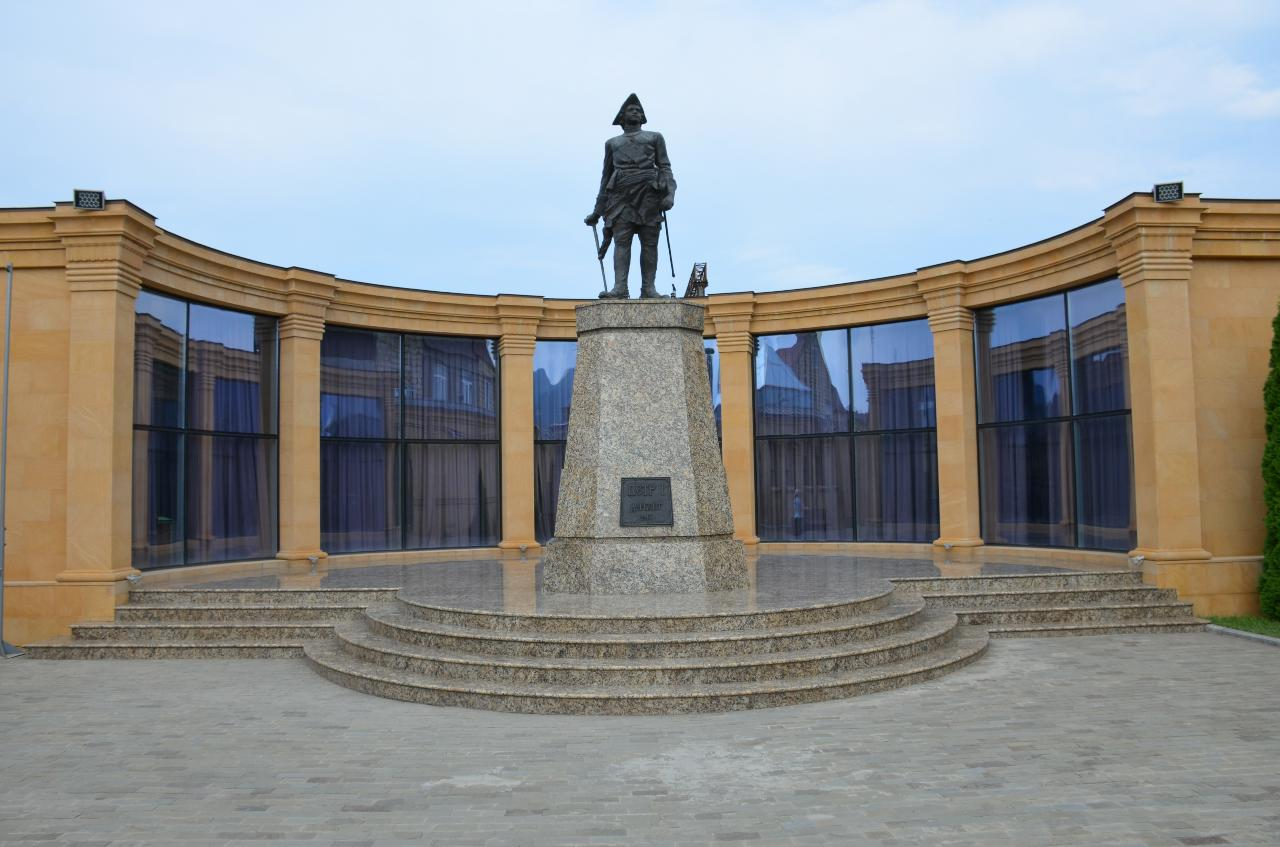 Экскурсия в Дагестан, 5-7 июля 2019 г.